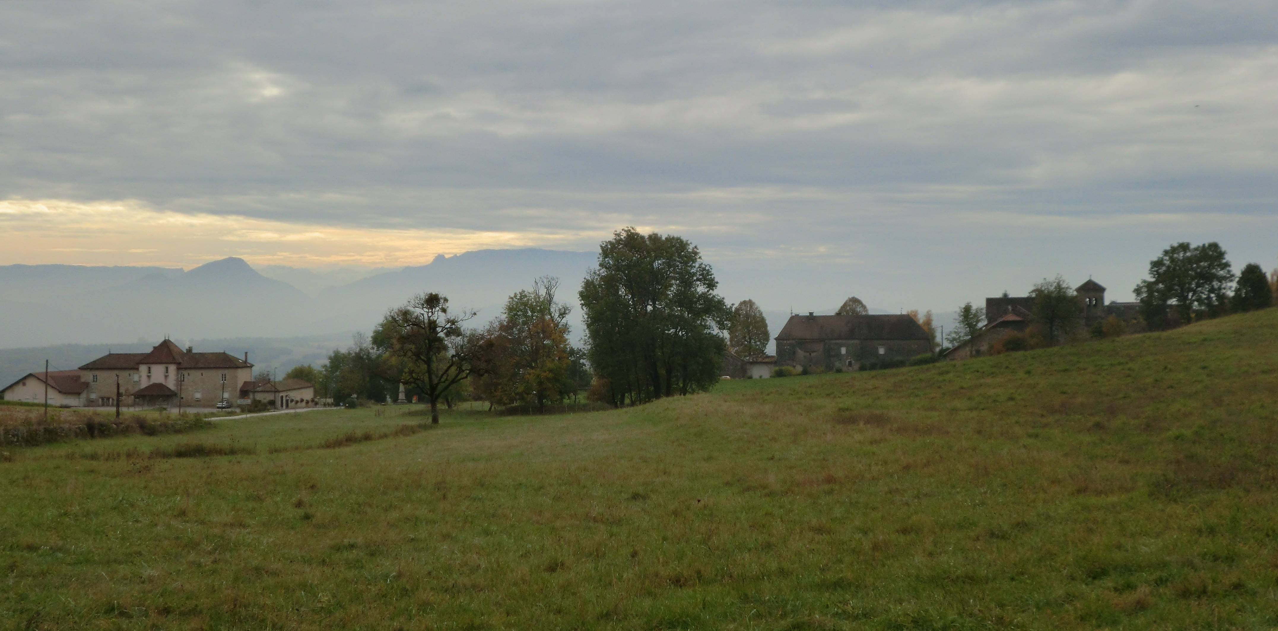 Aperçu du village de Belmont dans la commune de Belmont Luthézieu